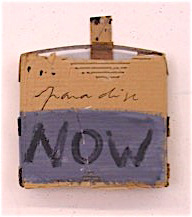 peinture